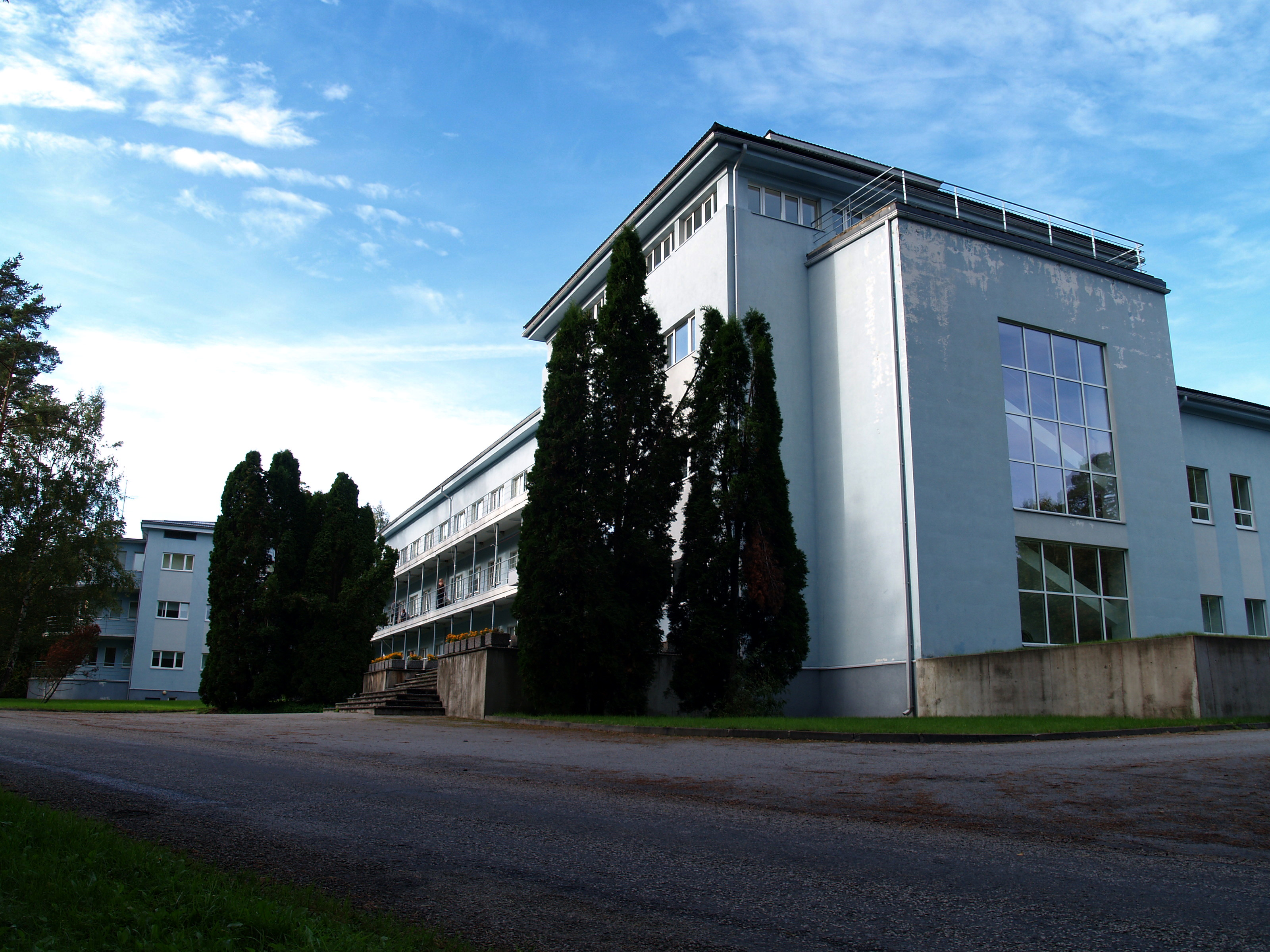 Kose sanatoorium